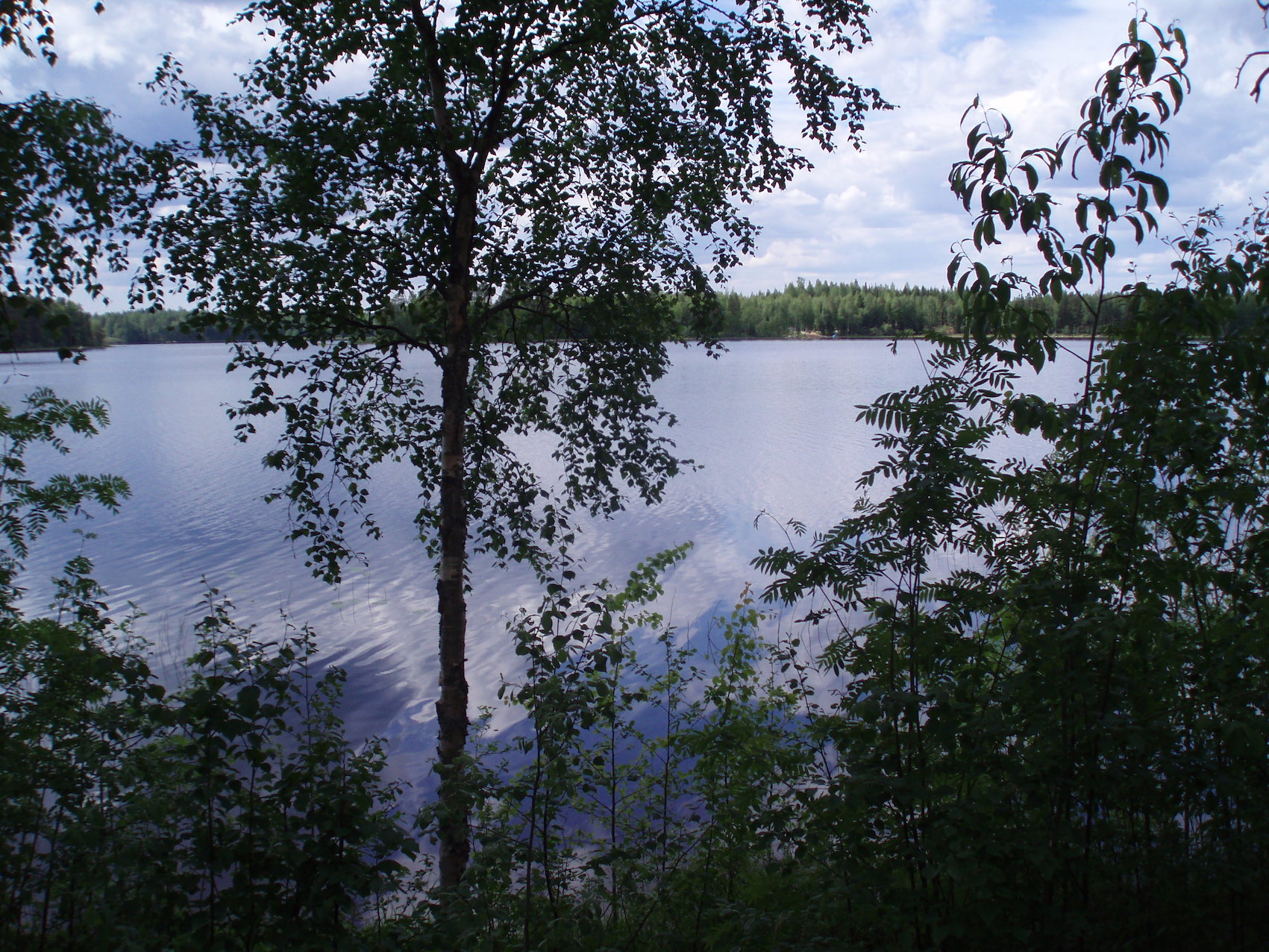 Vahojärvi Parkano